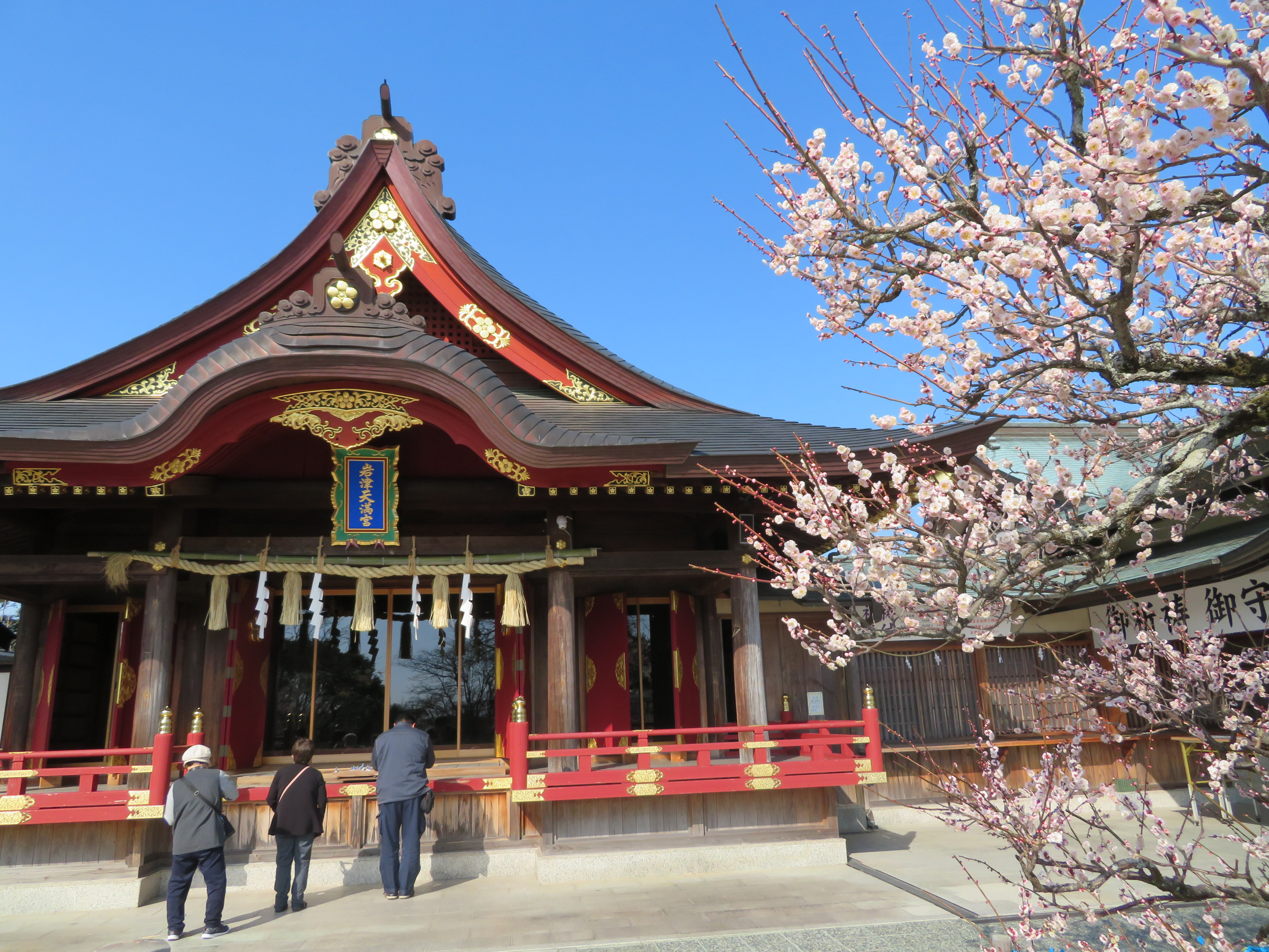 岩津天満宮（岡崎市岩津町）